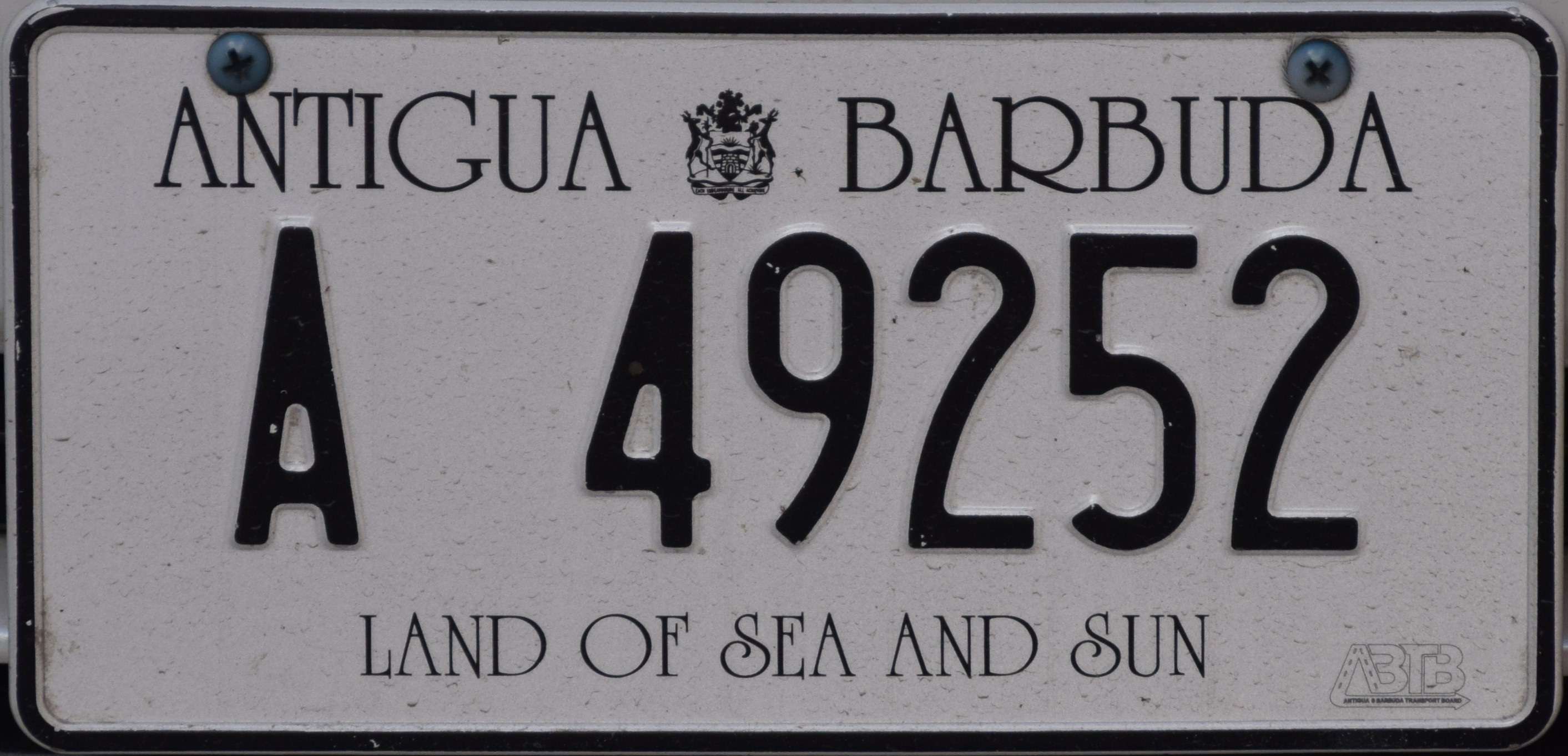 Personenauto kenteken Antigua and Barbuda